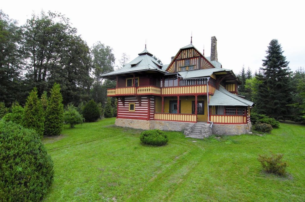 Vila na Rezku (Bartelmusova vila) Dušan Jurkovič- Foto: Foibos